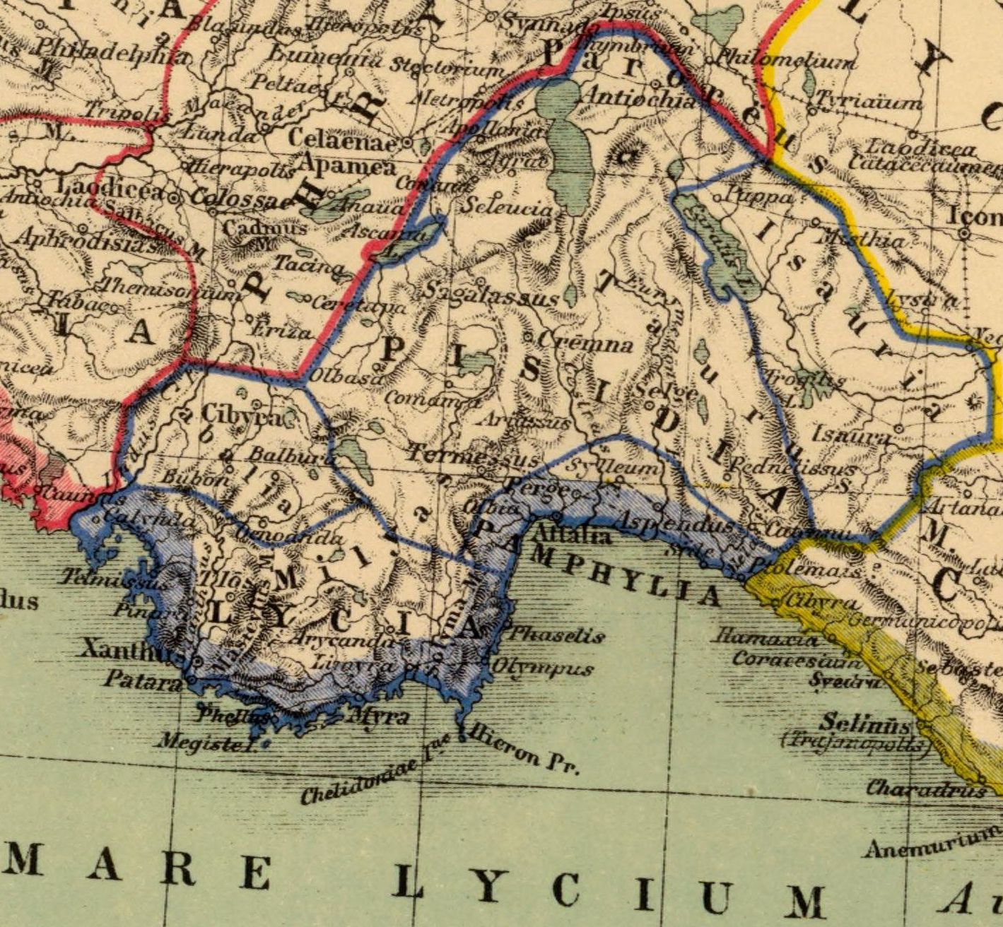 Pisidia. Asia citerior. Auctore Henrico Kiepert Berolinensi. Geographische Verlagshandlung Dietrich Reimer (Ernst Vohsen) Berlin, Wilhemlstr. 29. (1903)